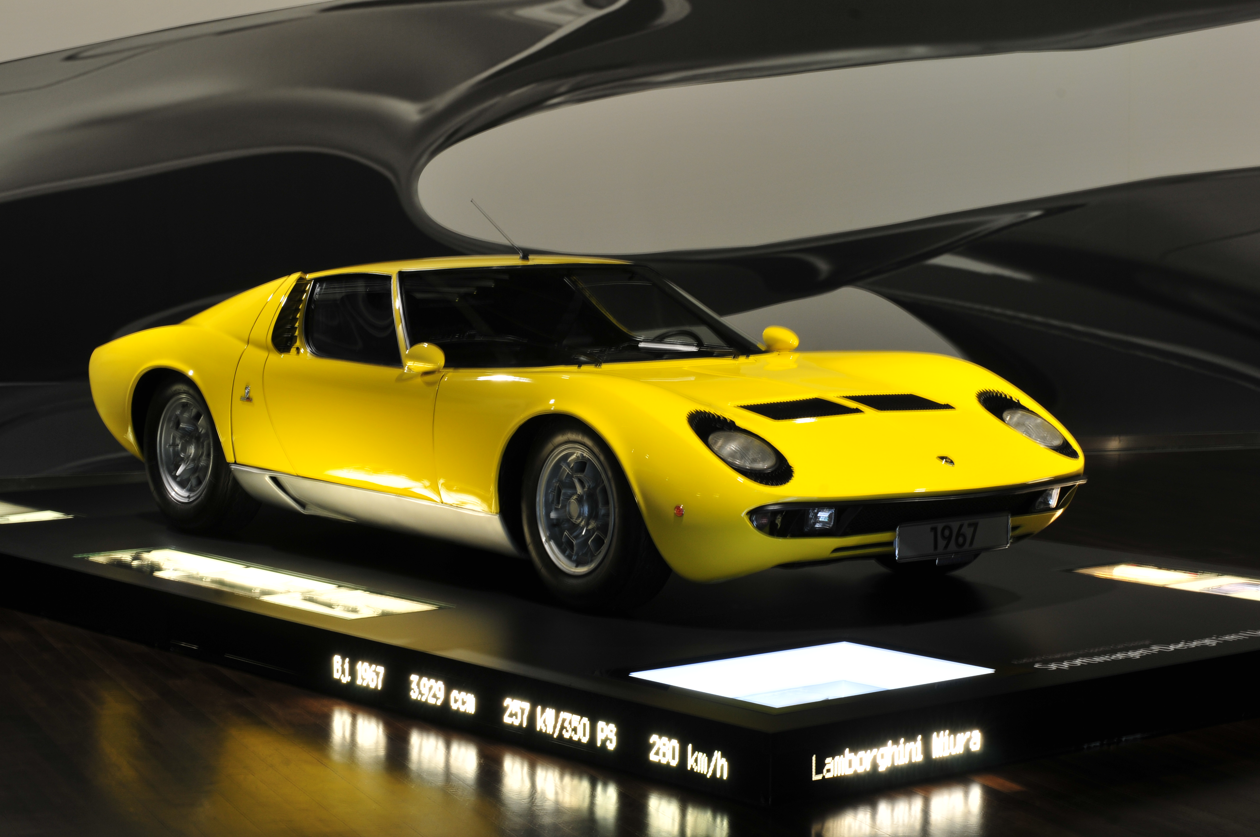 Autostadt Wolfsburg; Auto im Zeithaus